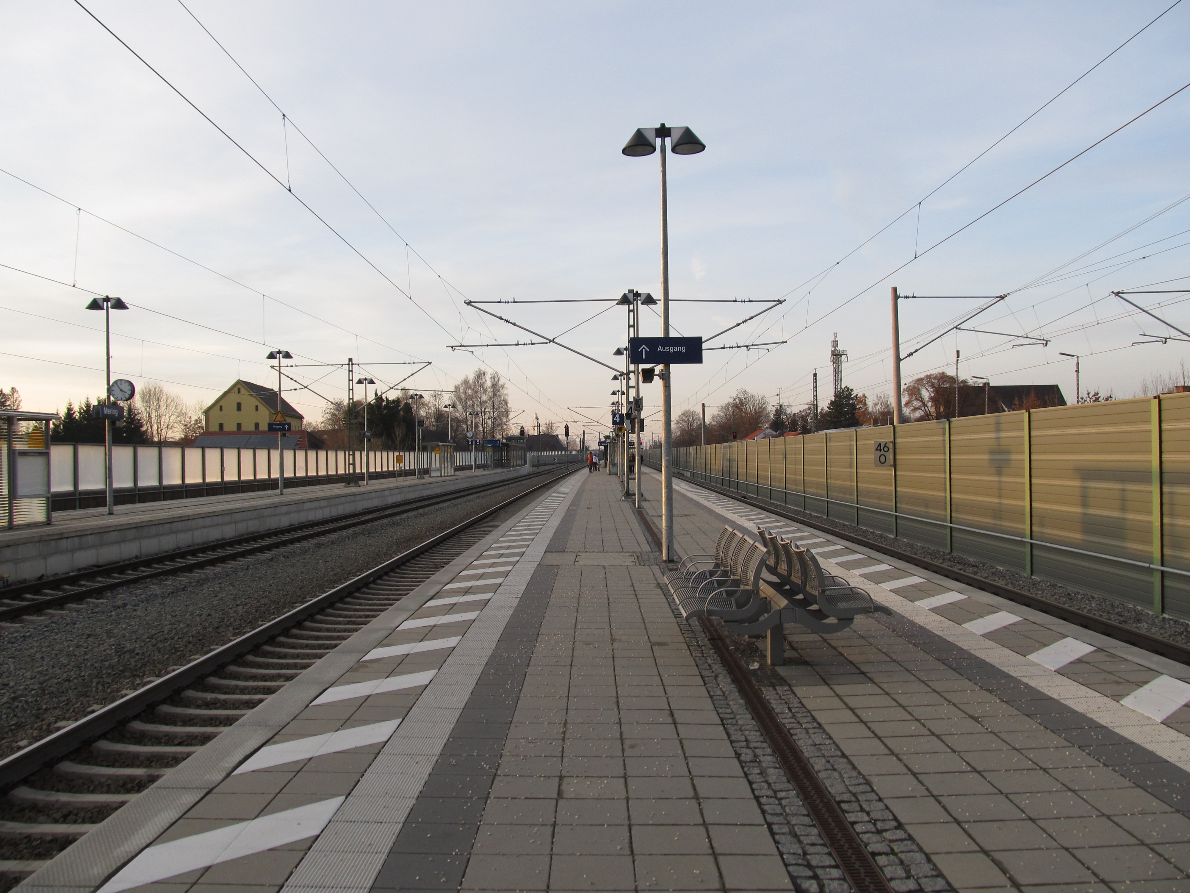 Bahnsteige des Bahnhofs Mering